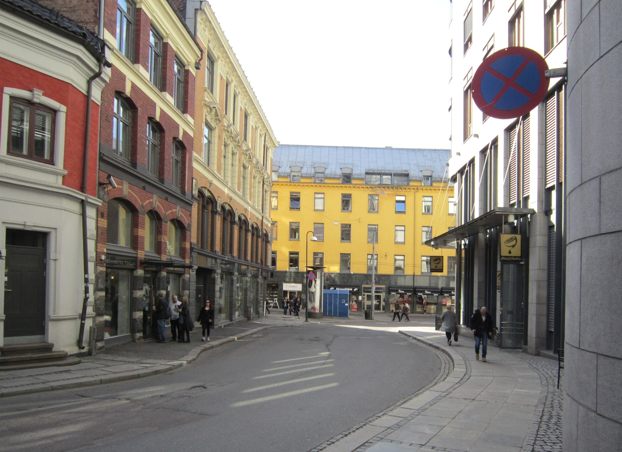 Apotekergata i Oslo sentrum